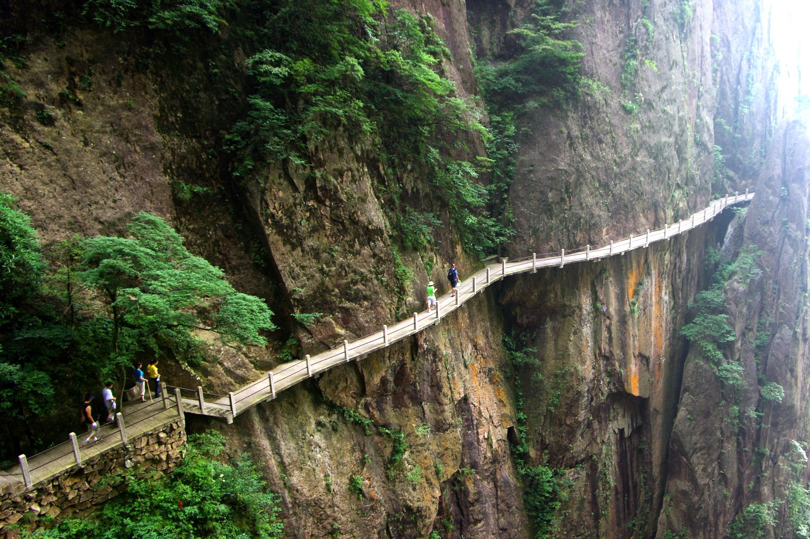 天下無山